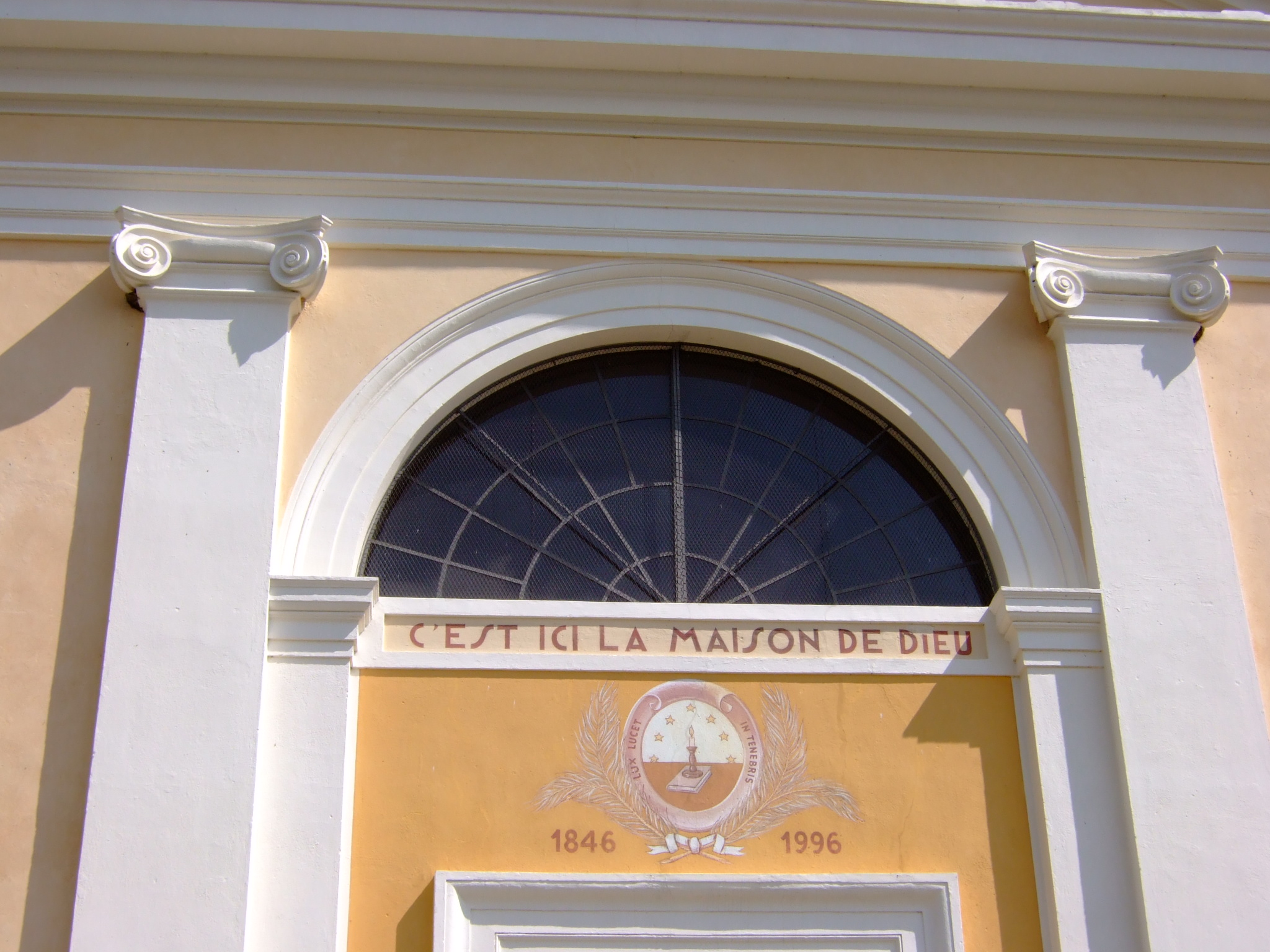 Le temple vaudois de Rorà